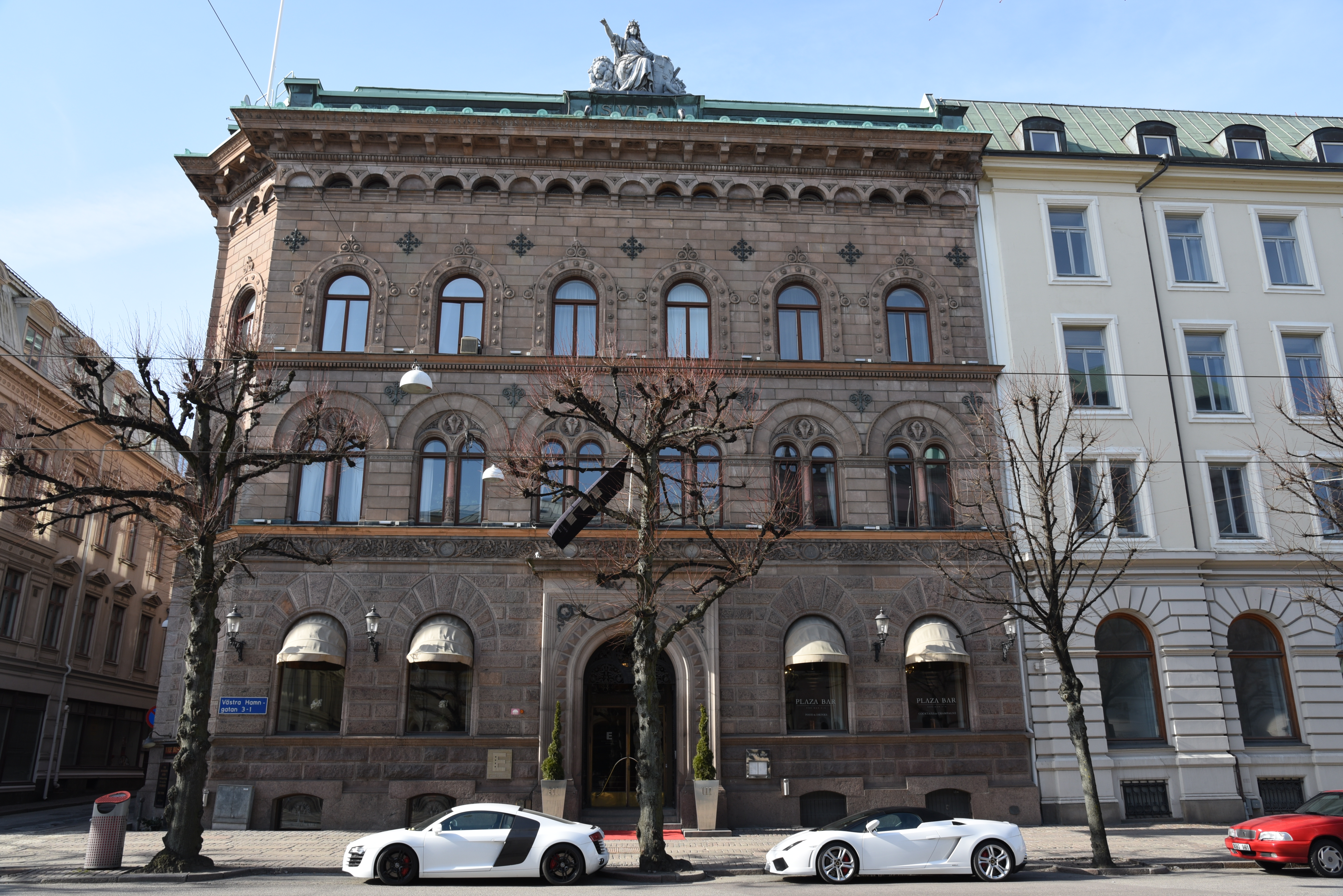 Sveahuset vid Västra Hamngatan 3–Drottninggatan 8 i stadsdelen Inom Vallgraven i Göteborg. Byggnaden uppfördes år 1888 för Brand- och lifförsäkrings AB Svea efter ritningar av A E Melander, vilka bearbetats av Hans Hedlund och Yngve Rasmussen.